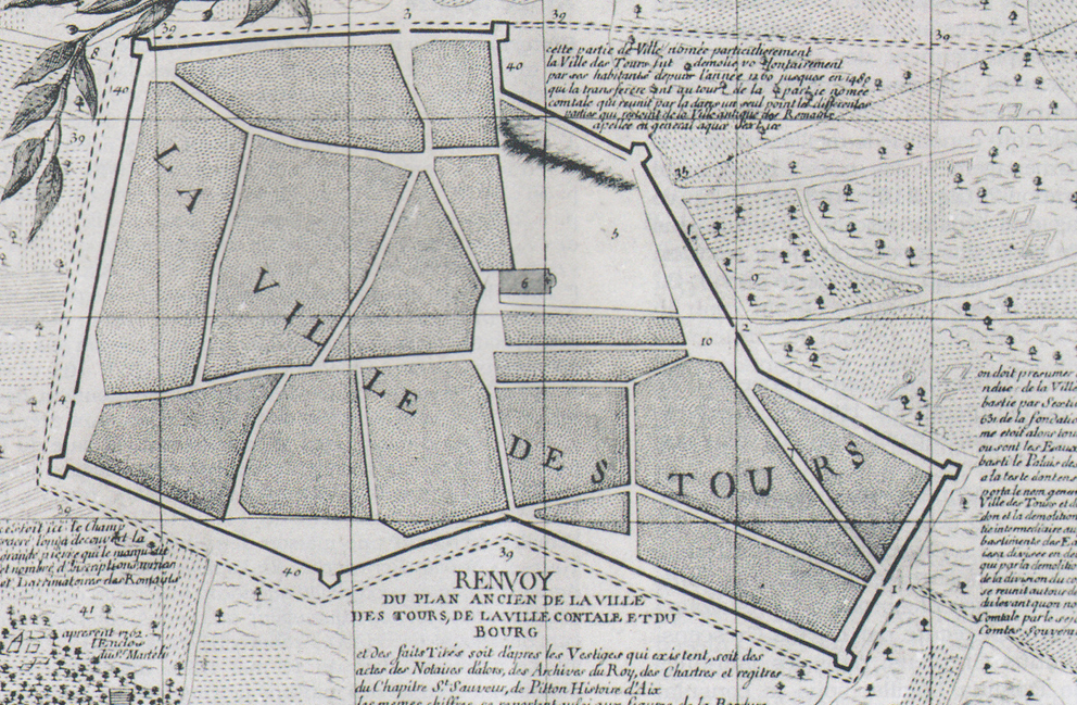 Ville des Tours dessinée par Etienne Devoux (détail).